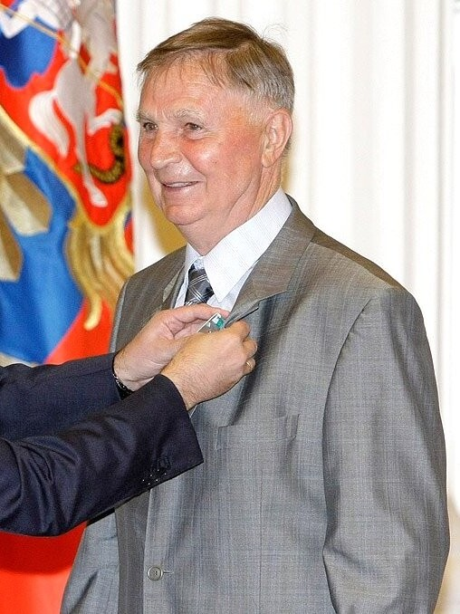 Виктор Тихонов